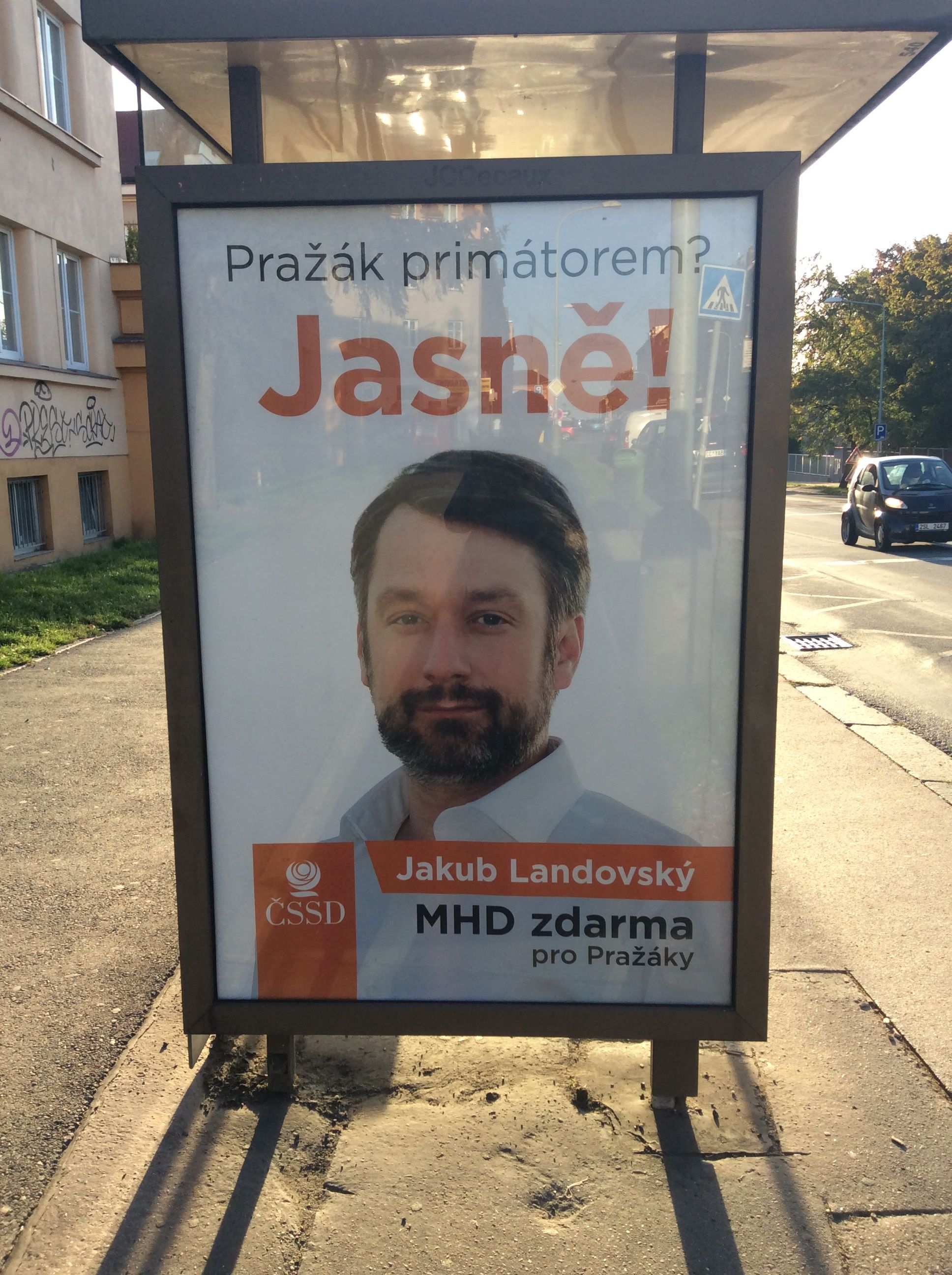 Предвыборная реклама кандидата в приматоры Праги Якуба Ландовского на автобусной остановке на улице Нововысочанской в Праге